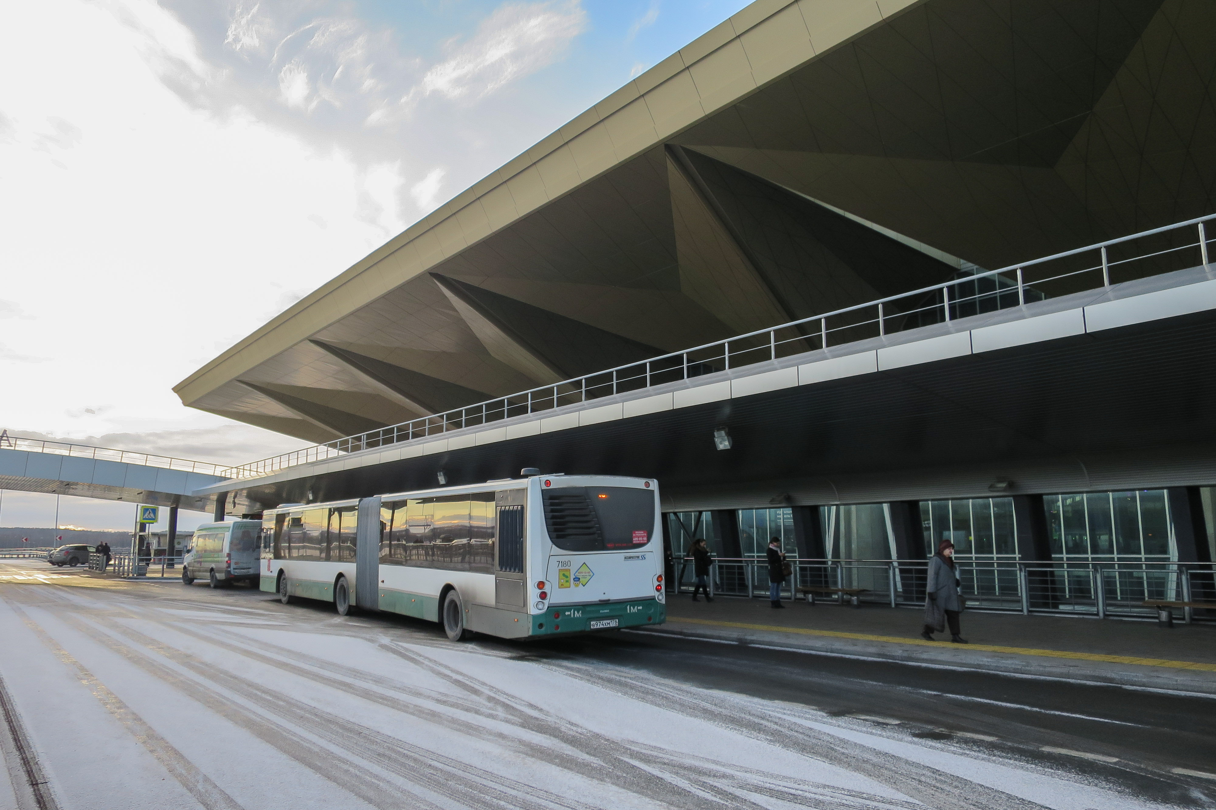 Vue de l'extérieur de l'aéroport de Saint-Pétersbourg - niveau des départs (Aéroport international Pulkovo) / Saint-Pétersbourg, Russie